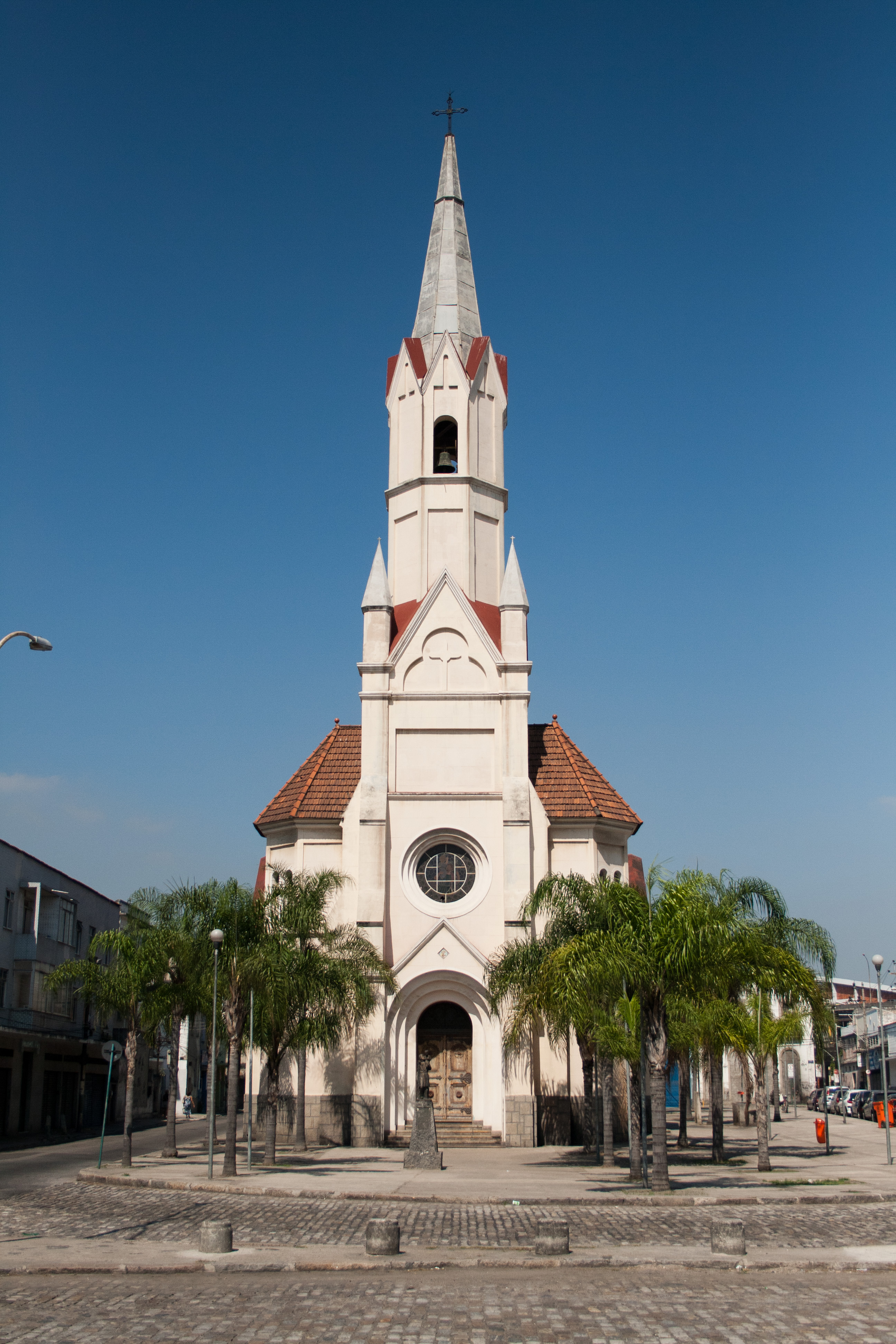 Somente no fim do século XIX é que a igreja tomou a feição que ora apresenta; isso aconteceu quando ali esteve o Cônego Luiz Antônio Escobar de Araújo que, tendo sido nomeado Vigário, realizou obras de grande monta, dando-lhe o elegante estilo gótico-romano que tanto a distingue dos demais templos religiosos. (Augusto Maurício)